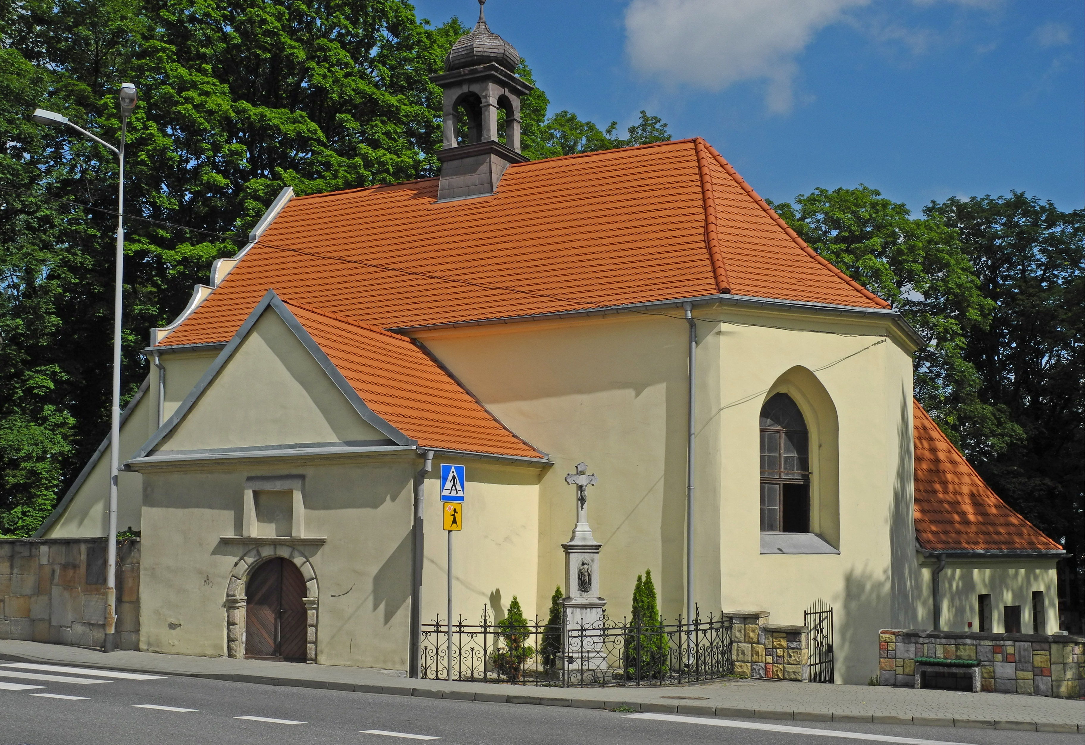 Friedhofskirche der „Hl. Dreifaltigkeit“ in Złoty Stok (Reichenstein in Schlesien)